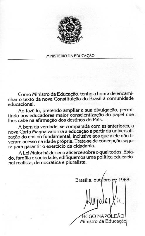 Mensagem do Ministério da Educação à comunidade educacional apresentado a Constituição do Brasil de 1988.Esta mensagem oficial compunha o exemplar da referida constituição distribuído pelo MEC.